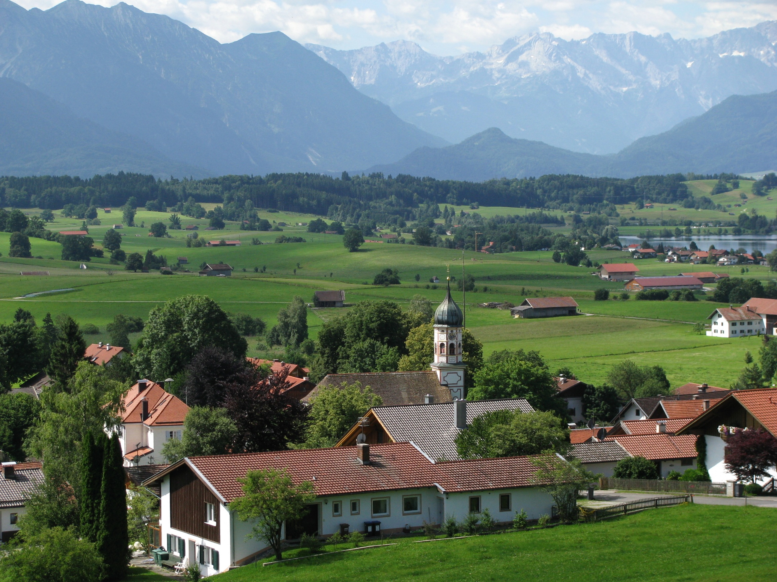 Aidling im Landkreis Garmisch-Partenkirchen von der Aidlinger Höhe aus gesehen; im Hintergrund Berge des Estergebirges (links) und des Wettersteingebirges (rechts, ganz hinten).